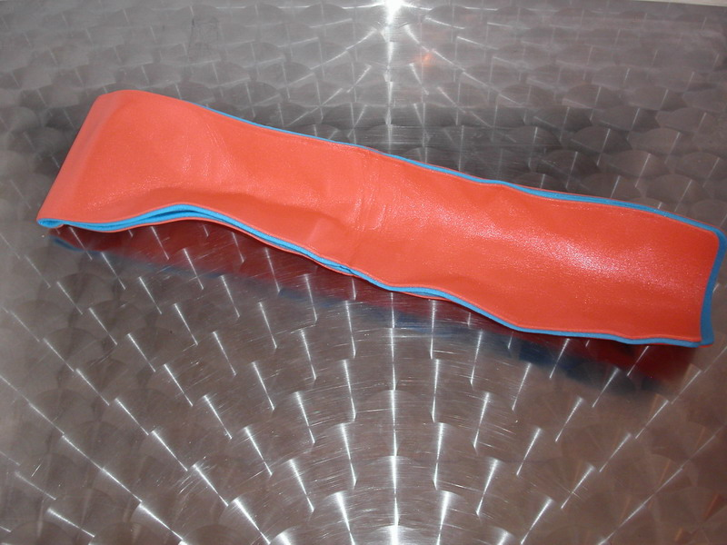 SamSplint - Schiene für Handgelenk#